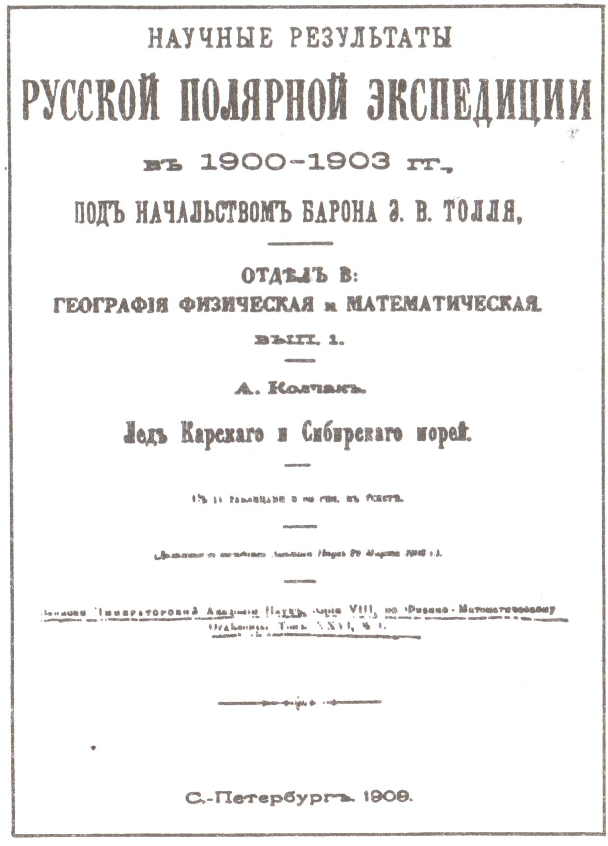 Титульный лист первого выпуска трудов Русской полярной экспедиции Императорской Академии наук